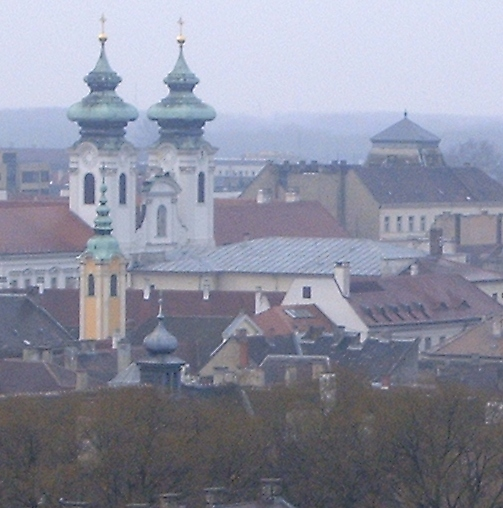 Óvárosi részlet: Győr (Győr-Moson-Sopron megye)